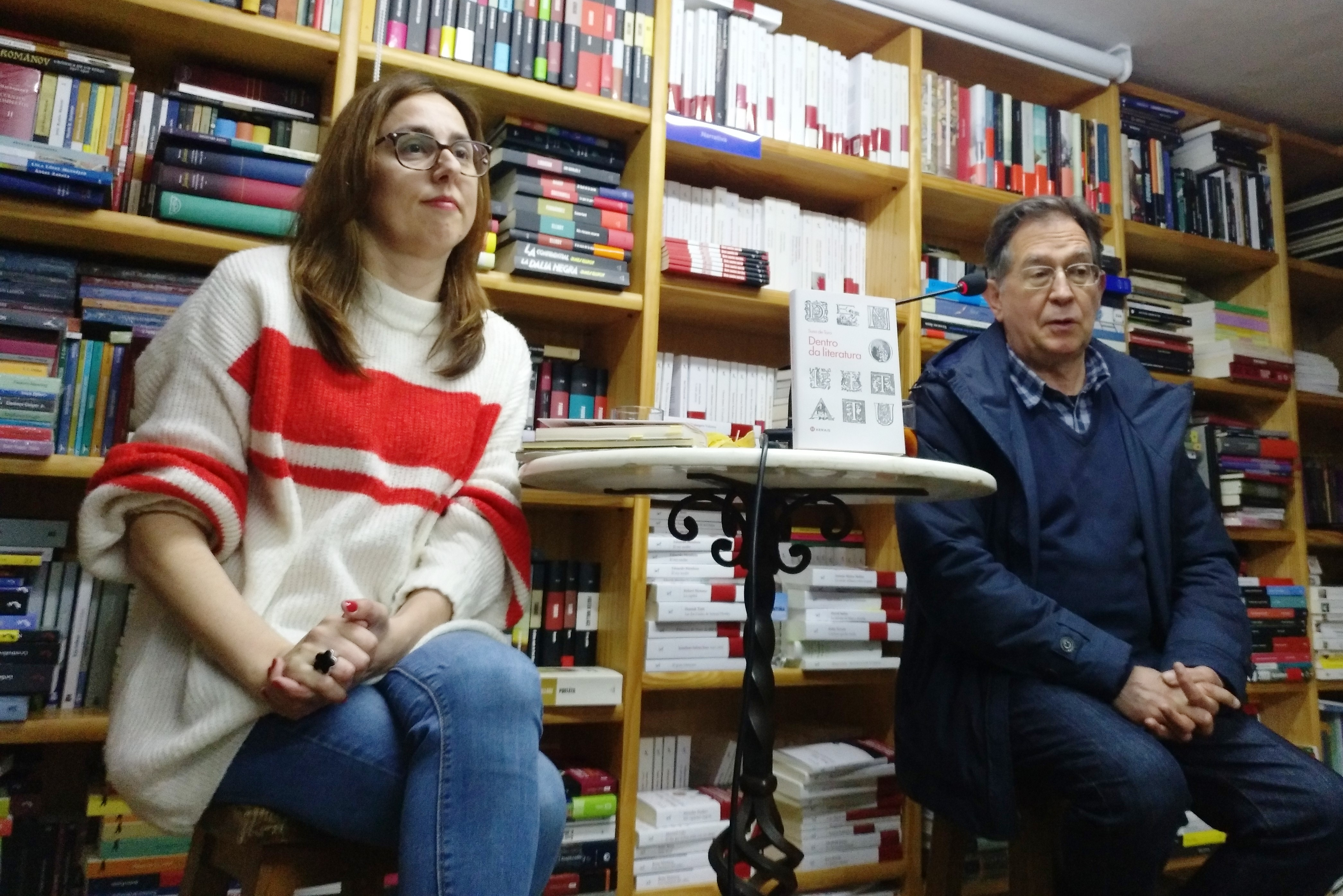 Ana Cabaleiro e Suso de Toro na presentación de "Dentro da literatura" na Libraría Paz de Pontevedra